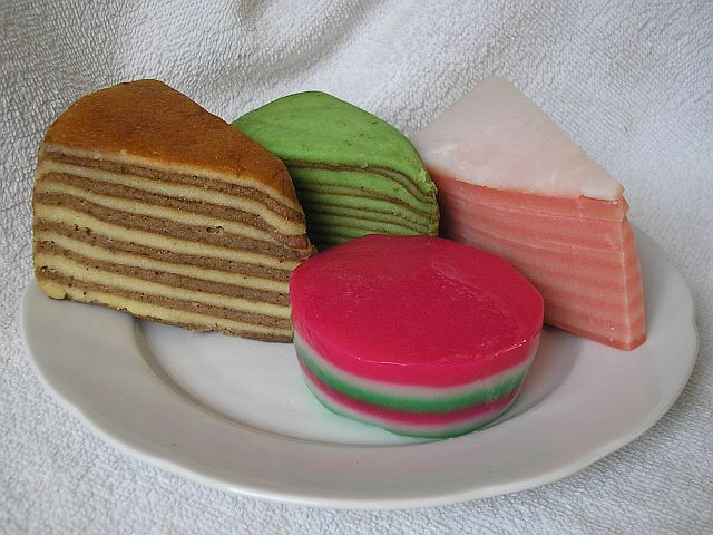 Spekkoek ('bacon cake') and Kue lapis - Indonesian layered 'pies' Location: Netherlands Keywords: Spekkoek, Kue lapis, Indonesia, pie, pudding, cake, sweet nl: Spekkoek en Kwee lapis (ook: kue lapis) - Indonesische lekkernij Locatie: Nederland Trefwoorden: Spekkoek, Kue lapis, Kue lapis, Indonesië, taart, koek, pudding